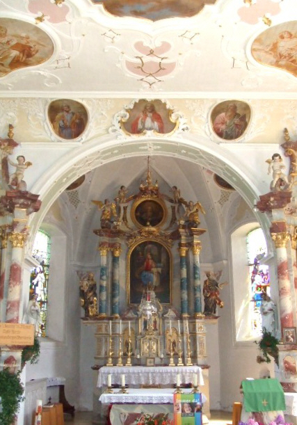 Pfarrkirche Maria Immaculata, Schwarzenberg, Gemeinde Oy-Mittelberg, Landkreis Oberallgäu